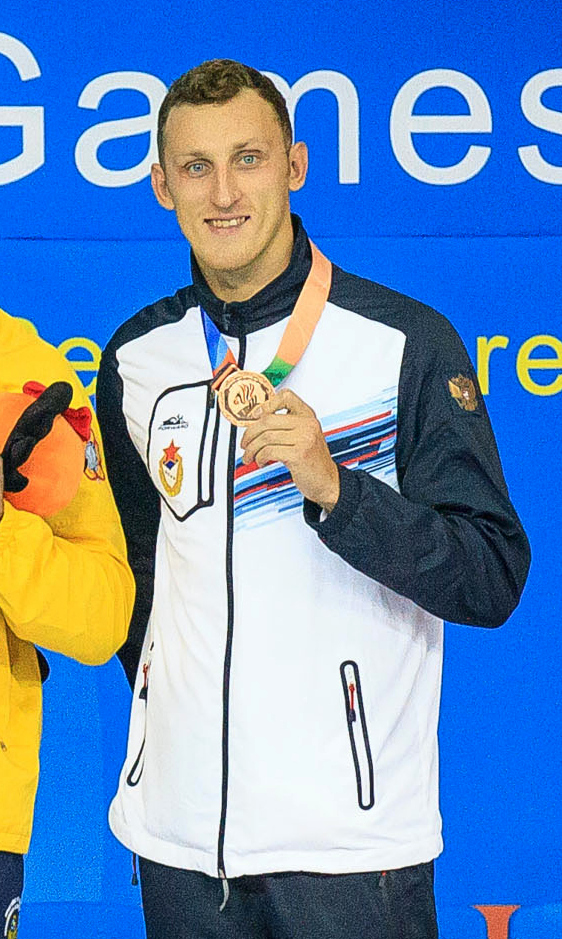 Nikita Konovalov. Foto: Sgt Johnson Barros